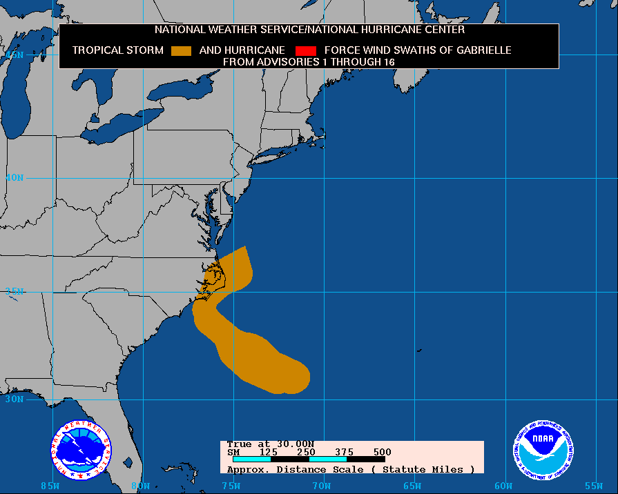 Cummulatief stormveld van Gabrielle als tropische- en subtropische cycloon.